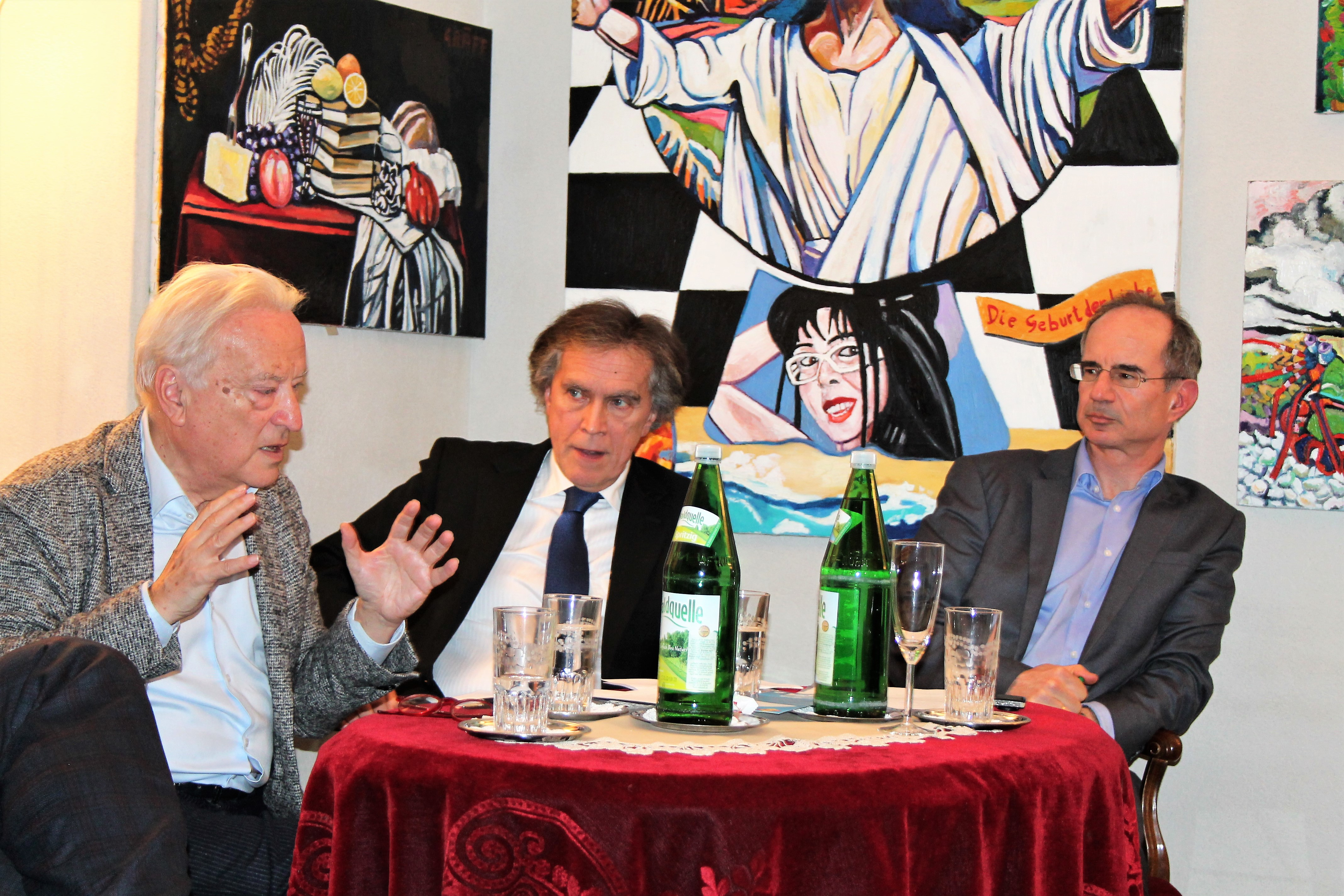 Veranstaltungsreihe "Dialog im Kamptal". "Politik, Diplomatie im 21. Jahrhundert", veranstaltet durch Georgia Kazantzidu und Matthias Laurenz Gräff im Atelier Gräff in Zitternberg, Gars am Kamp, 27. 1. 2020 vortragende Diskutanten: S.E. Botschafter Dr. Emil Brix, MEP ret. Dr. Hannes Swoboda (ehemals Präsident der europäischen Sozialdemokraten im EU-Parlament), Philipp Jauernik, BA (Paneuropabewegung Österreich) Moderation durch Dr. Eric Frey (Der Standard) Personen am Foto: Hannes Swoboda, Emil Brix, Eric Frey